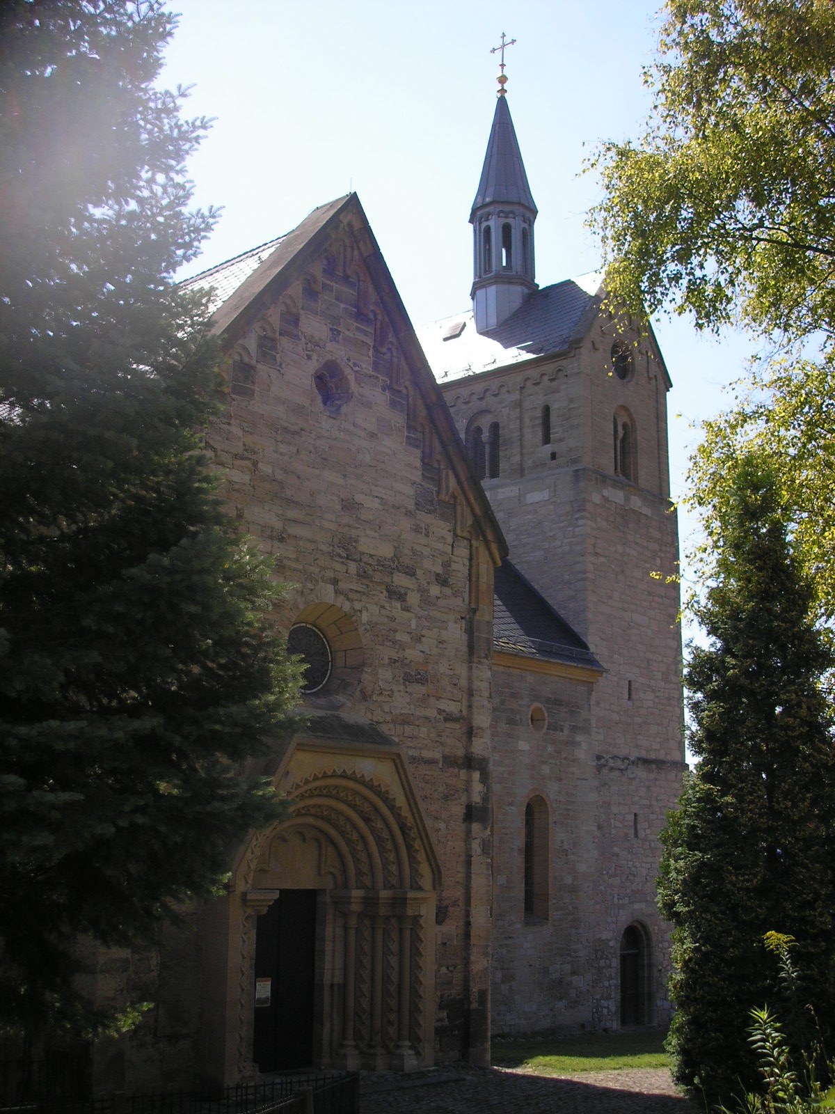 Die Stadtkirche in Treffurt (Thüringen).